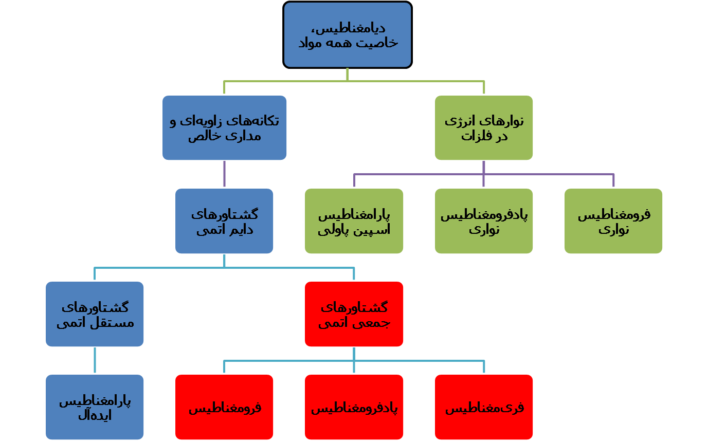 انواع مغناطش و سرچشمه آنها